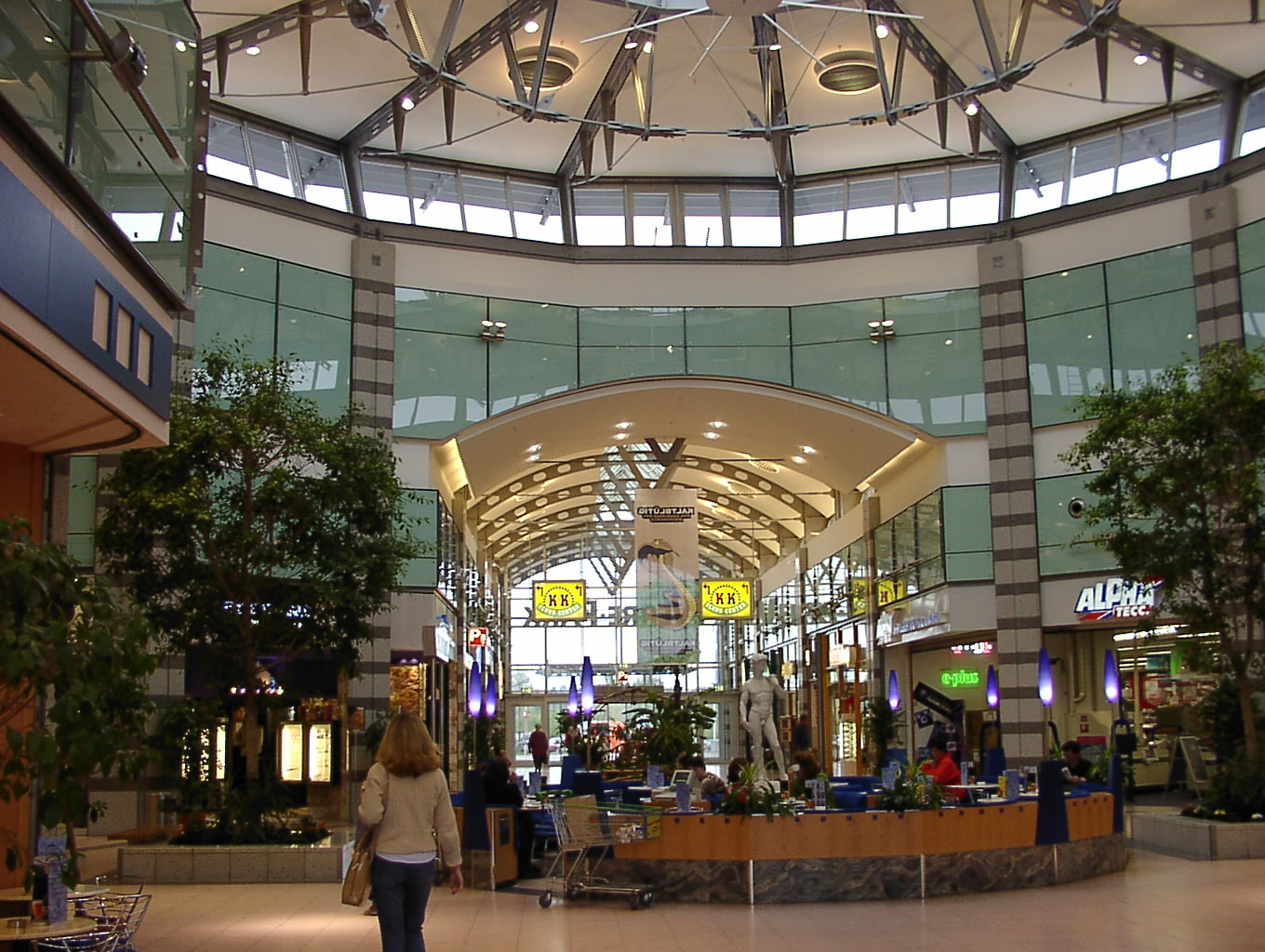 Im Werrepark Bad Oeynhausen Sonstiges: ...